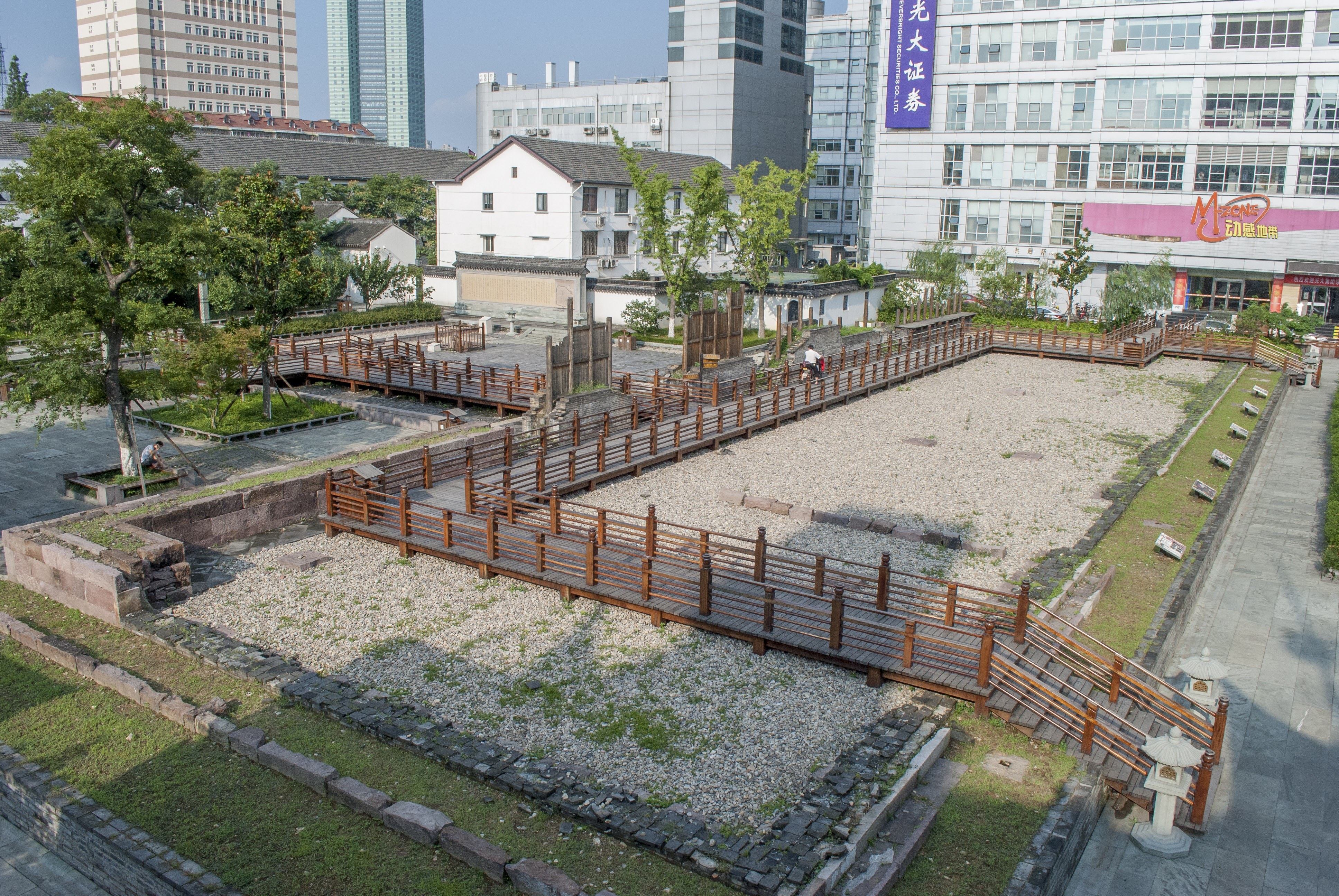 永丰库遗址鸟瞰